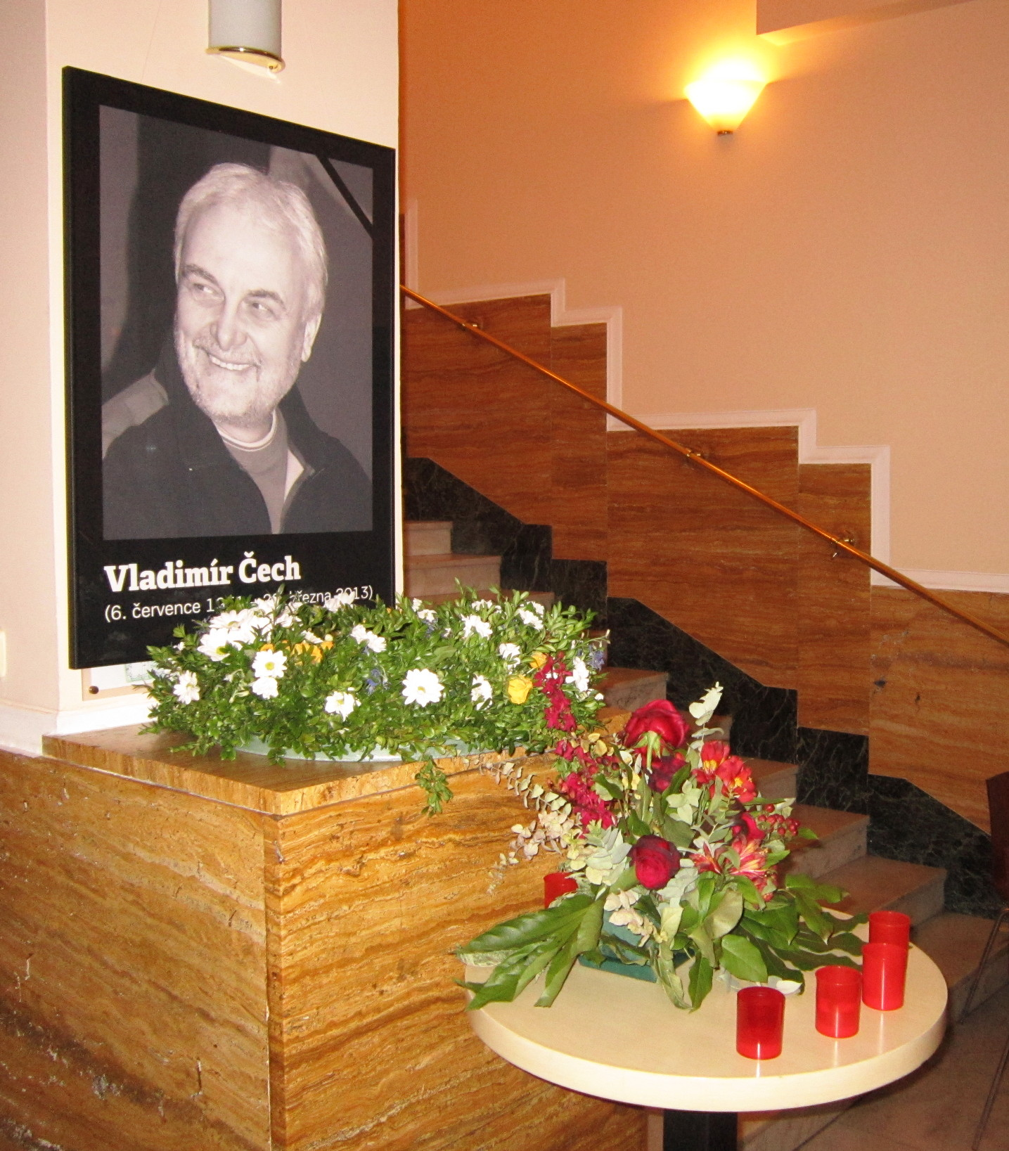 Vzpomínka na zemřelého Vladimíra Čecha (1951–2013) ve foyer Divadla ABC.